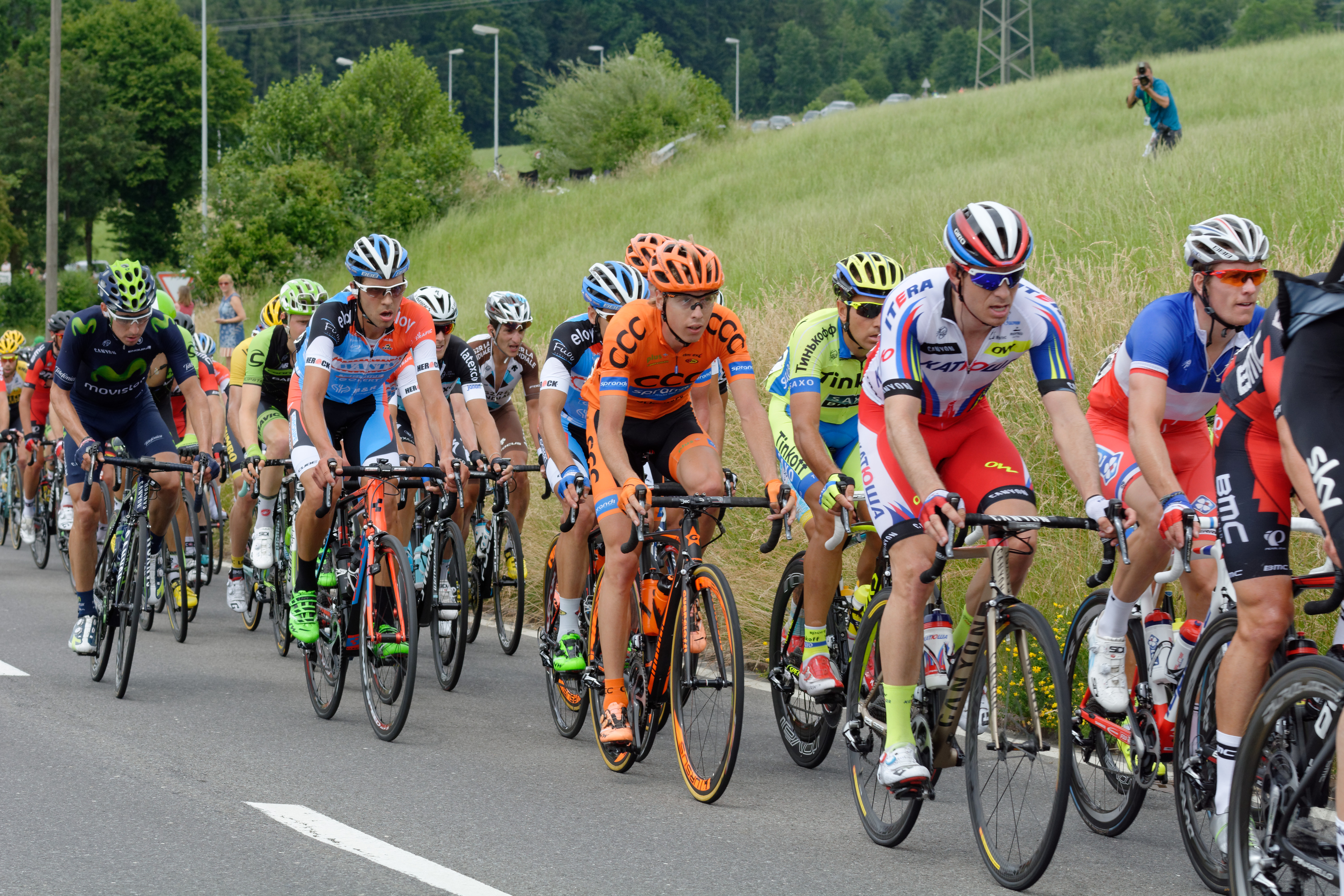 D71_0209_DxO